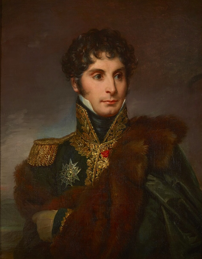 Historien, membre de l'Académie française, représenté en uniforme, sous la restauration en 1828